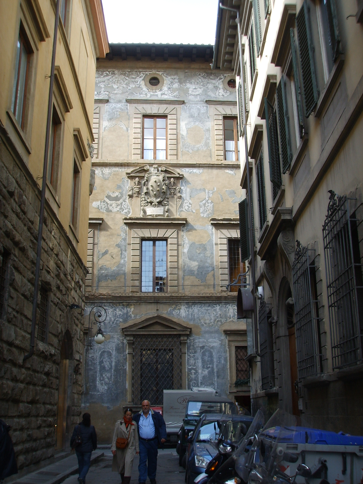 Palazzo_Ramirez_da_Montalvo in Florence, Italy